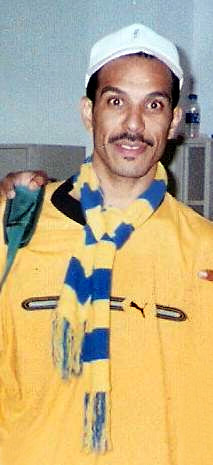 Saleh Al-Daoud